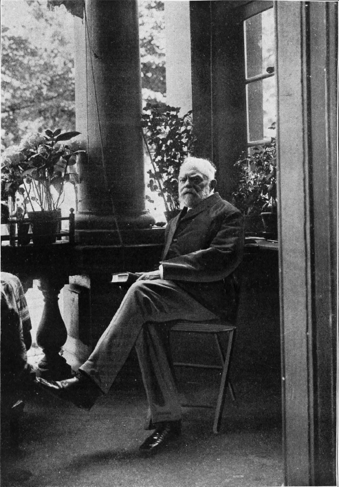 Bernhard Weiß (1827-1918), deutscher evangelischer Theologe, Exeget und Textkritiker des Neuen Testaments.